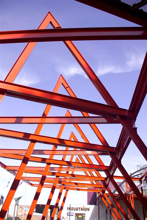 stalen constructie Industrion